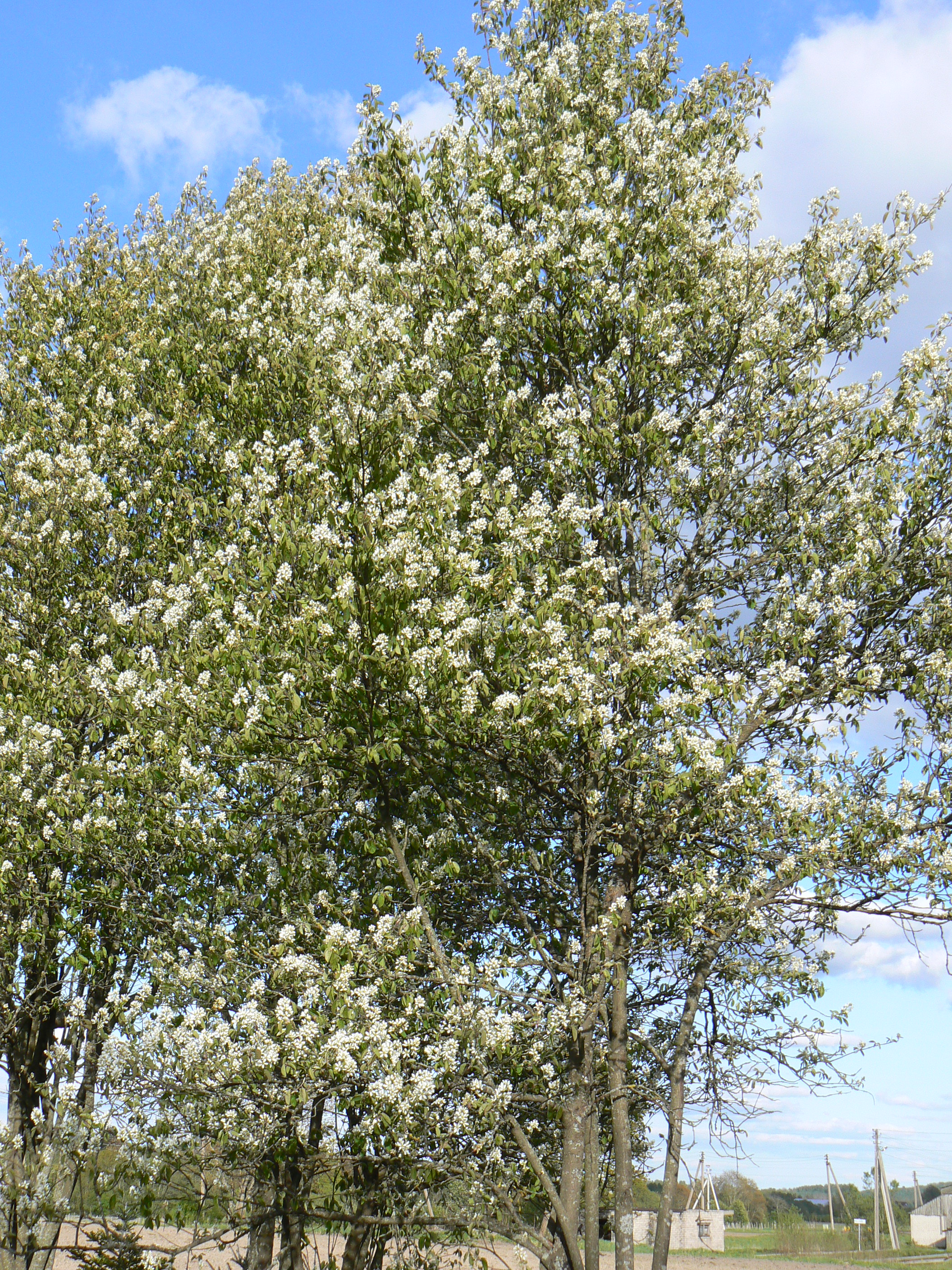 Muchovník oválný, kvetoucí. Habitus. Fotografováno v okrese Šilalė